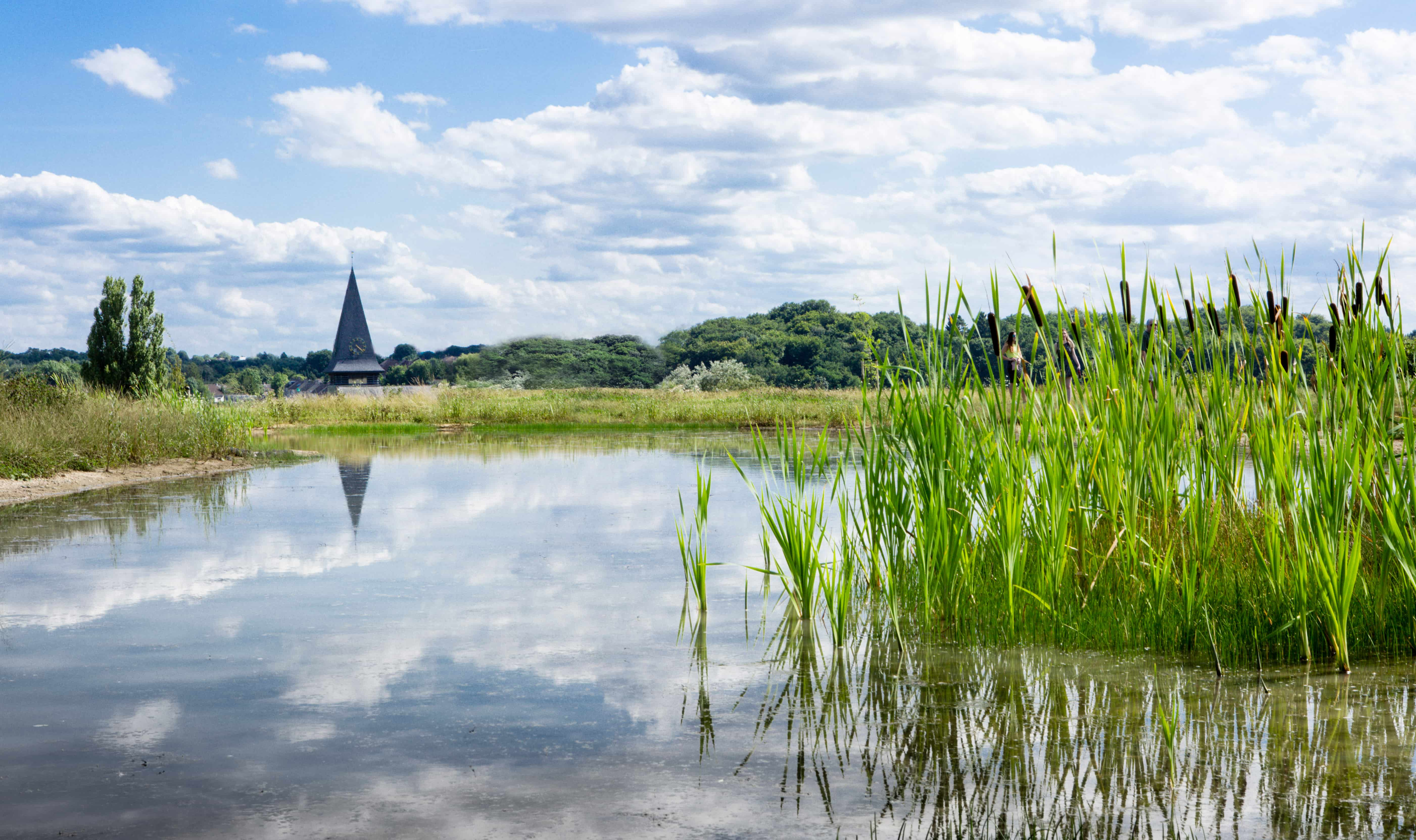 Eygelshof is de eerste natuurbegraafplaats van Zuid-Limburg. Door de hoge ligging biedt dit nieuwe natuurgebied een uitzicht over het omliggende heuvellandschap.